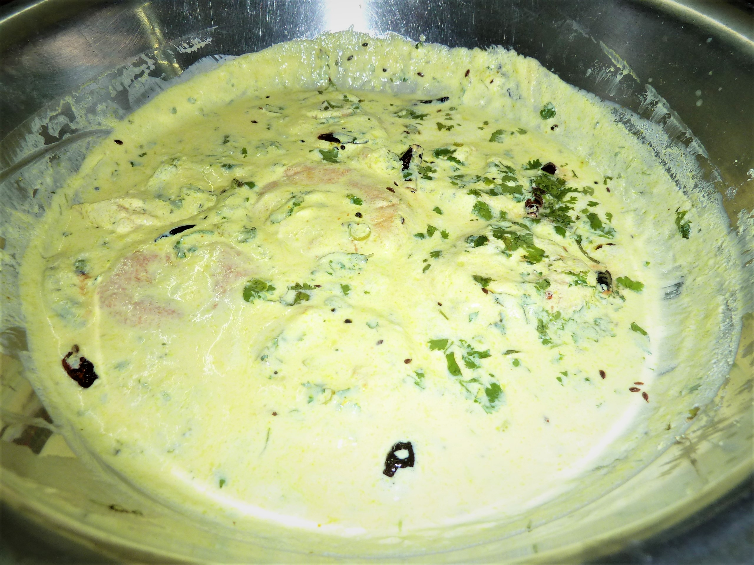 ఆవడలు